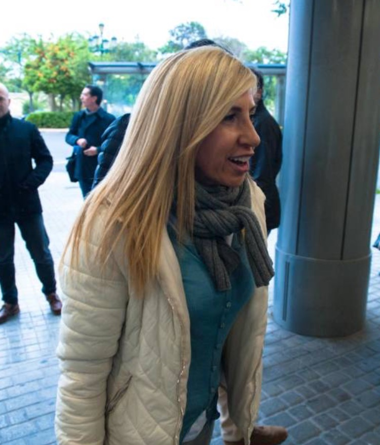 Marta Torrado en 2017